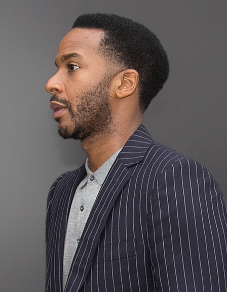 Toronto International Film Festival 2016